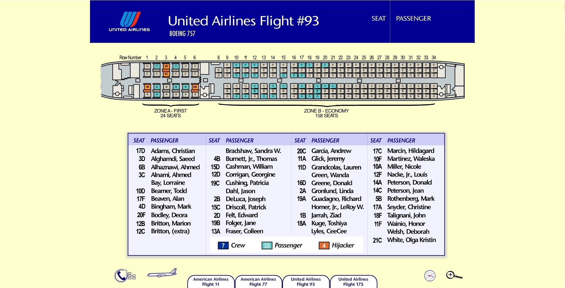 Auszug aus einer Flash-Präsentation, welche im Gerichtsverfahren United States vs. Zacarias Moussaoui (Nr. 01-455-A) verwendet wurde (